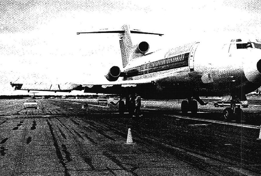 Northwest Airlines Flight 299（N278US）